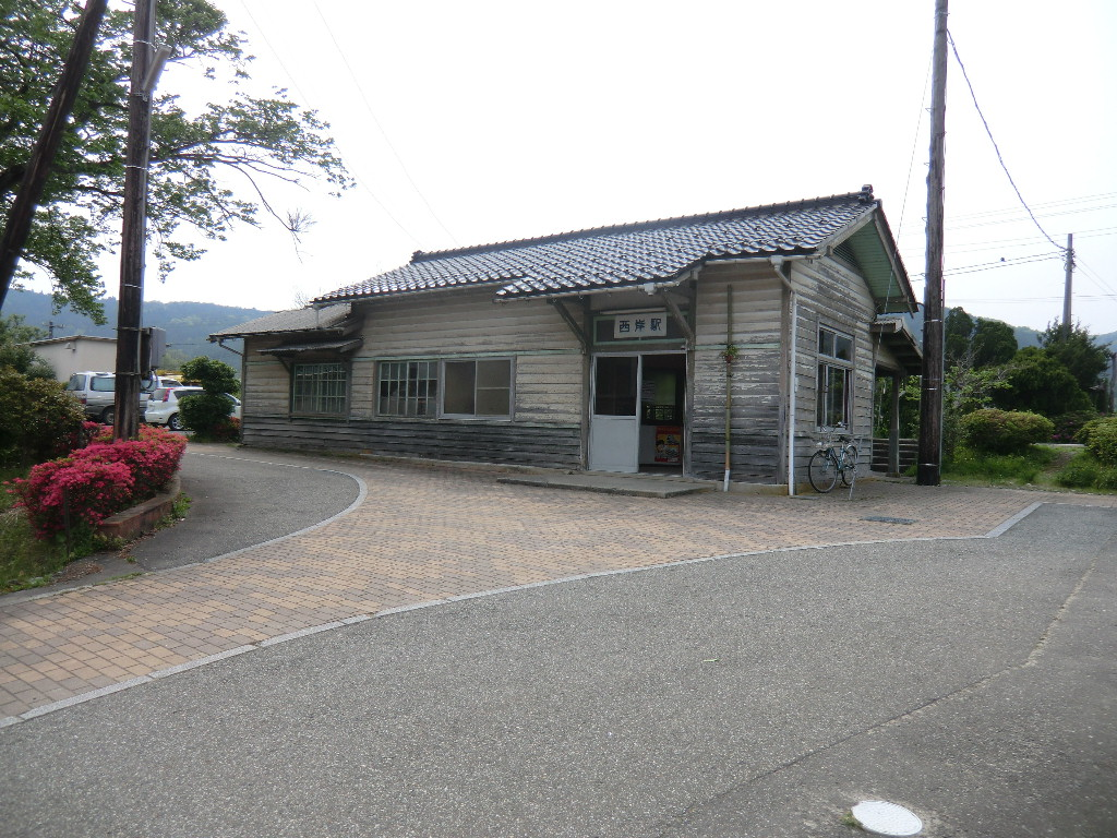 西岸駅